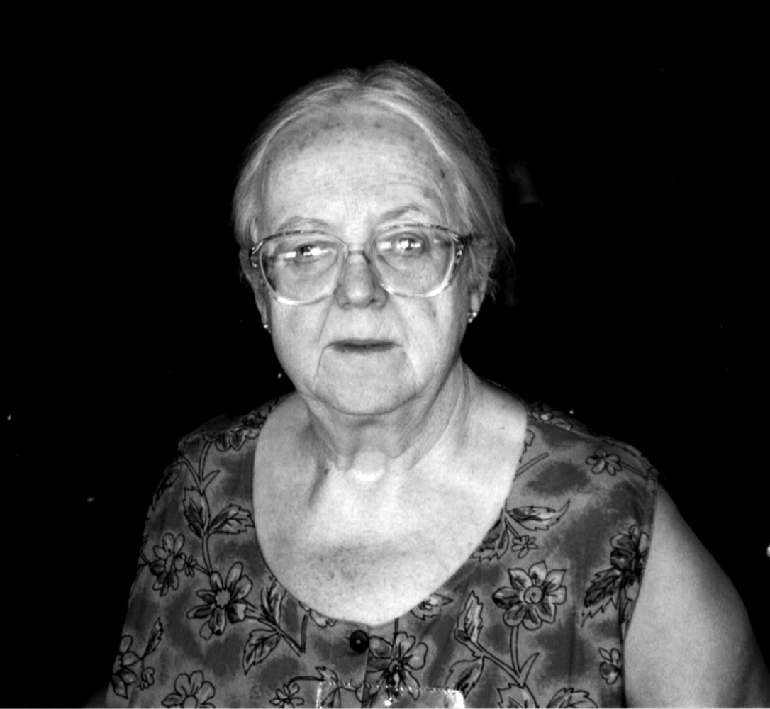 Marjorie Boulton je la Universala Kongreso de Esperanto en Berlino.